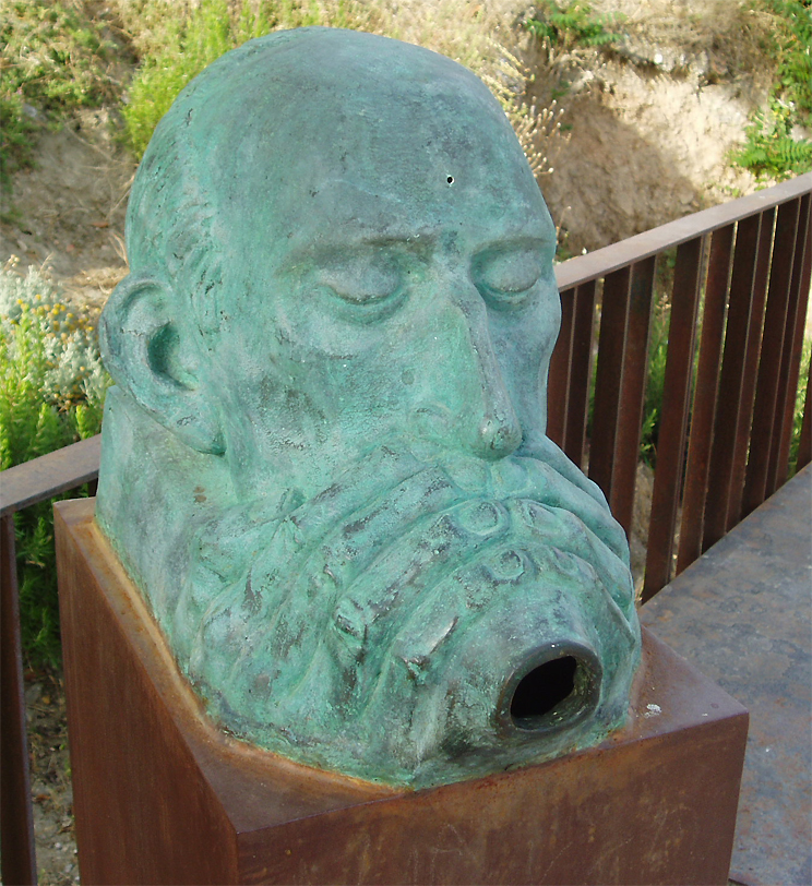 Escultura del cineasta Jose Val del Omar en su localidad natal, Loja (Granada).